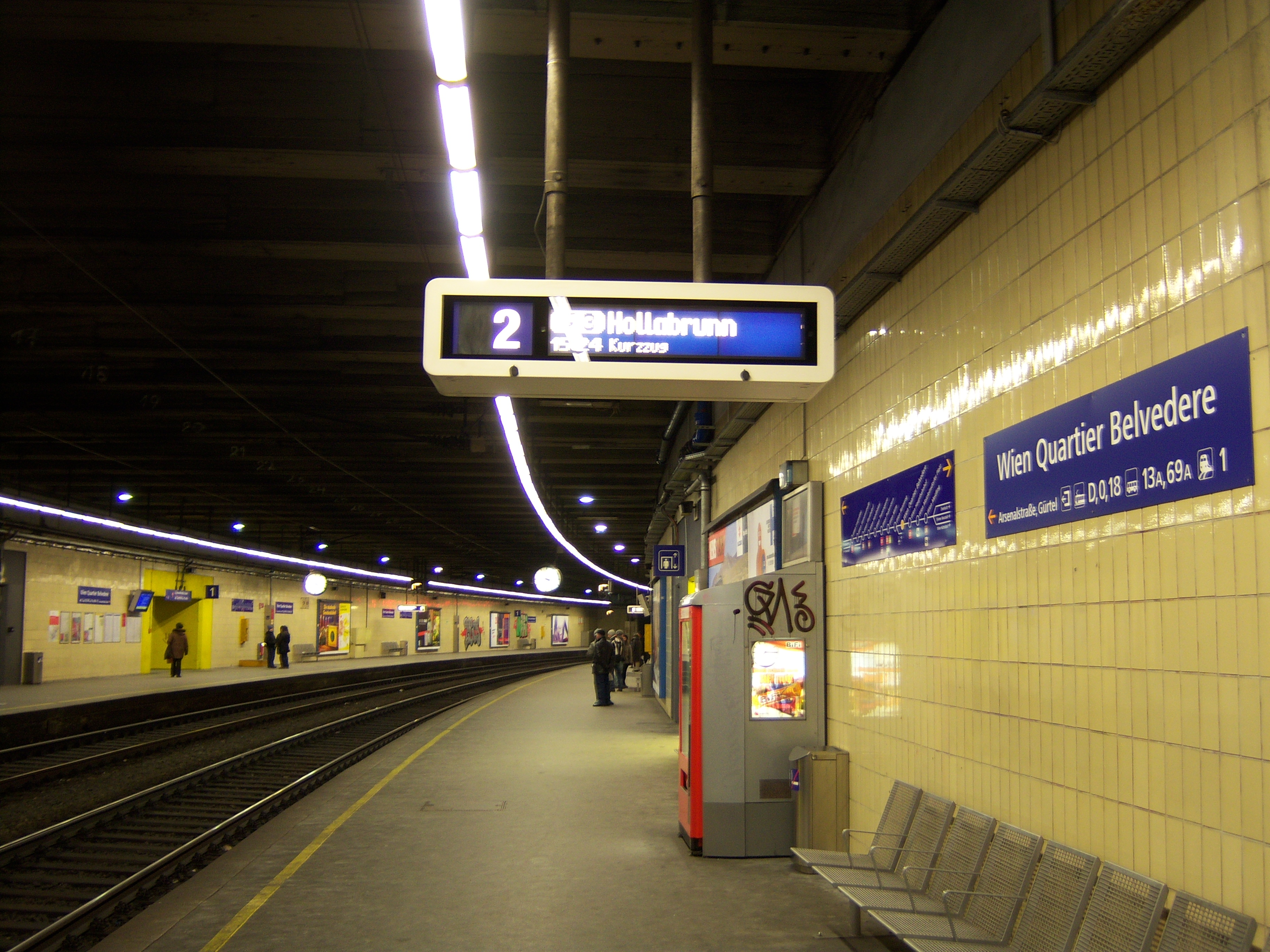 Die Bahnstation Wien Quartier Belvedere